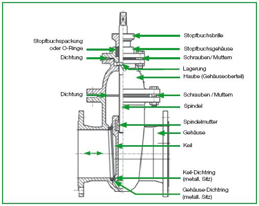 Aufbau eines metallisch dichtendend Absperrschiebers